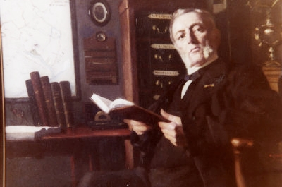 Portret van Pieter Kors Dommisse, gemeentesecretaris te Vlissingen